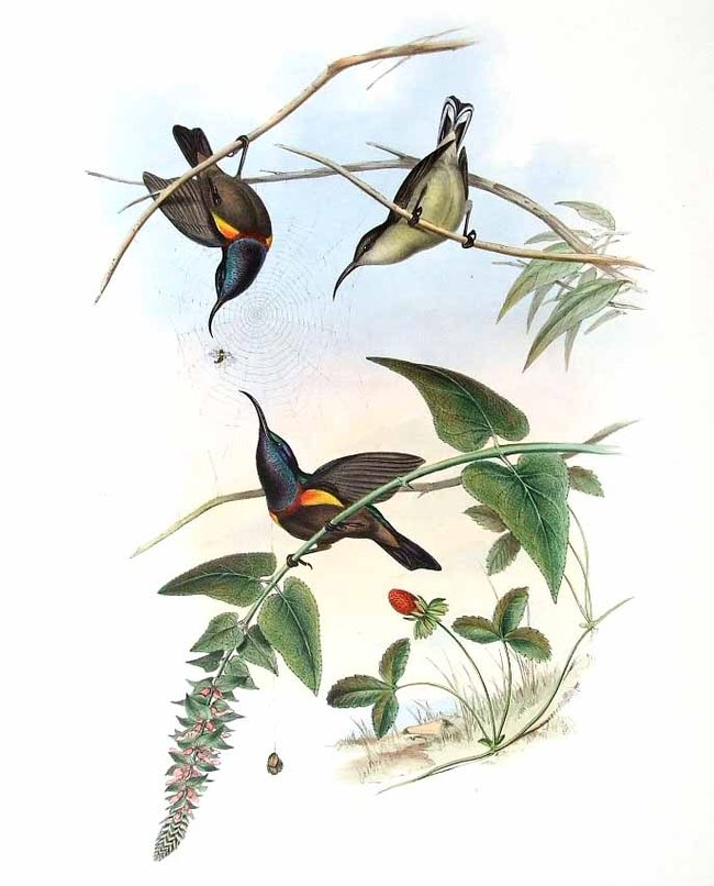 Nectarinia lotenia